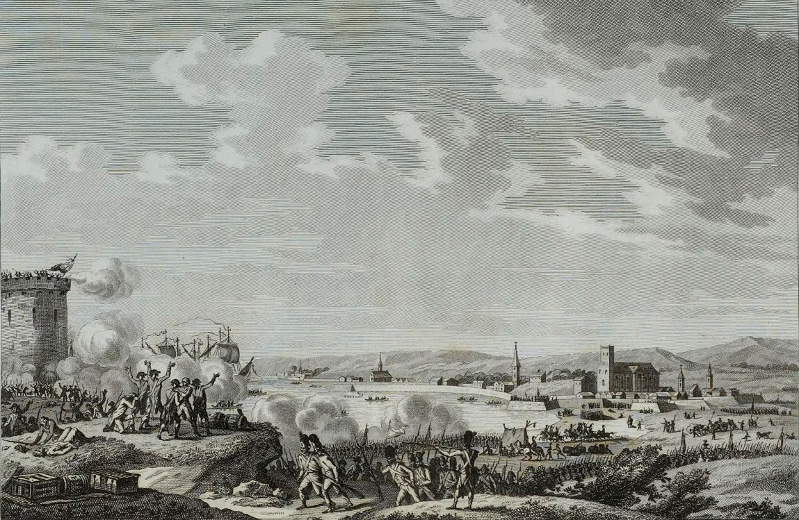 Débarquement de Quiberon le 21 juillet 1795 (défaite royaliste, anglaise et des émigrés hostiles à la Révolution française), Musée de la Révolution française - Vizille.